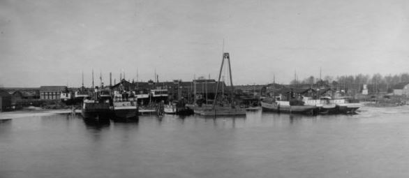 Alkuperäinen kuvaus: Lehtoniemen telakka järveltä päin kuvattuna.